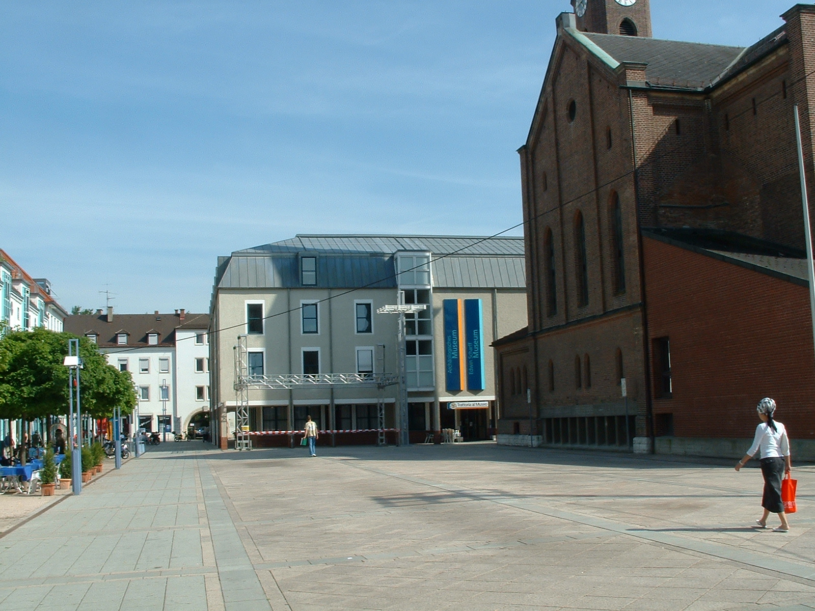 Petrusplatz Neu-Ulm mit Petruskirche (rechts) und Blick auf die Museen am Petrusplatz (hinten)